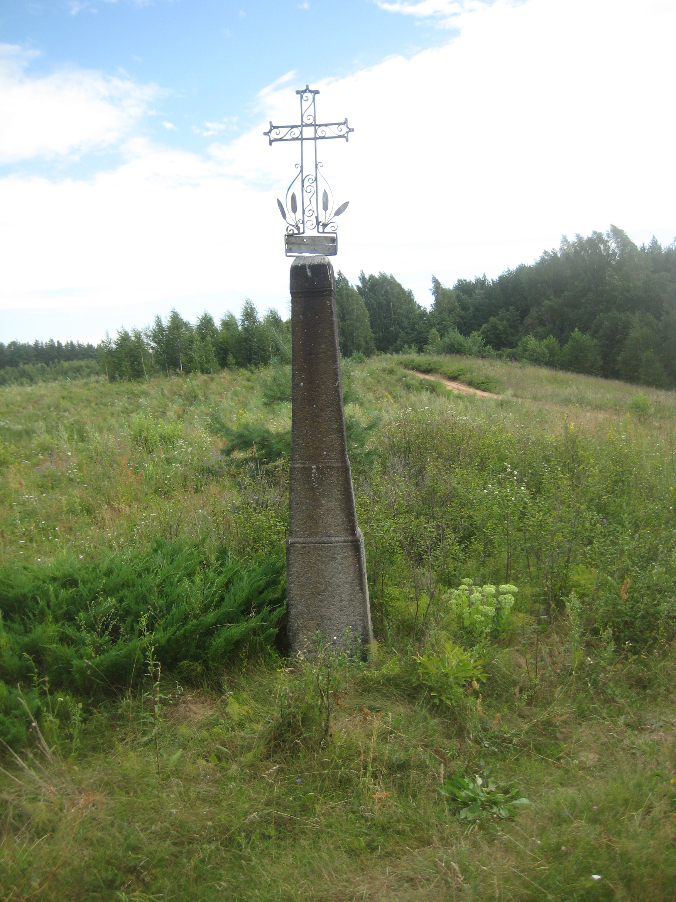 Dusetų sen., Lithuania